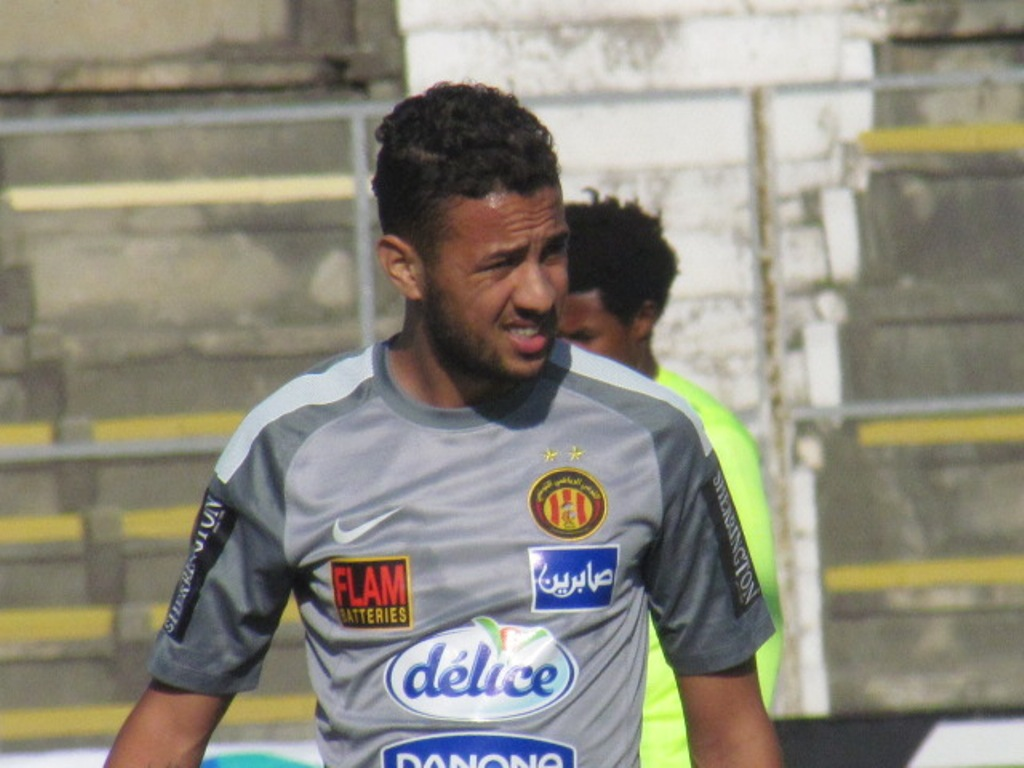 Iheb Mbarki à l'échauffement